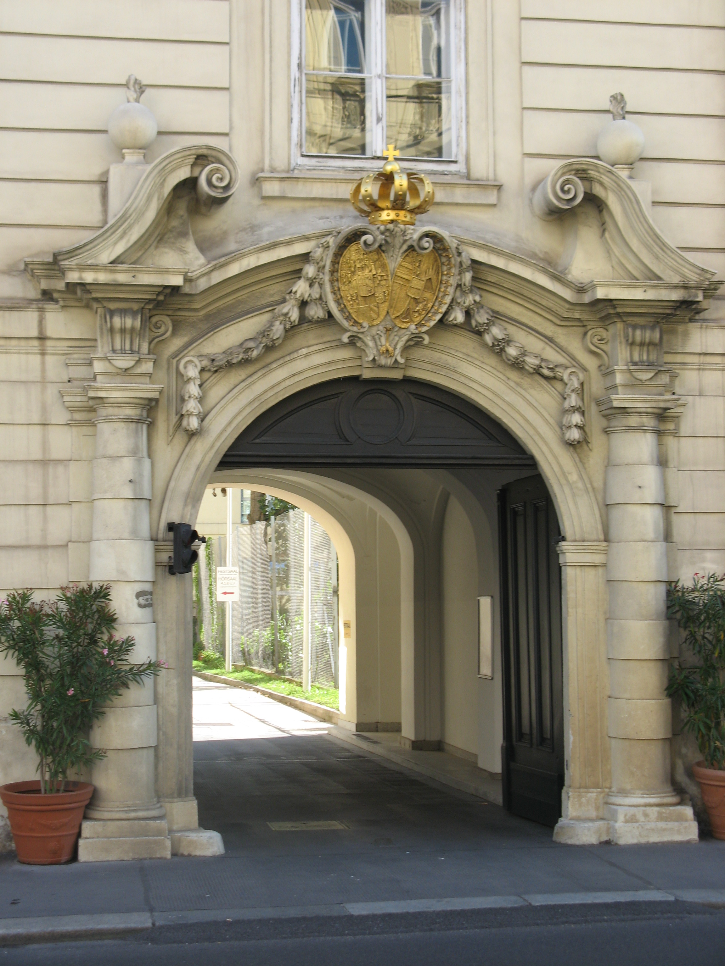 Tor zur Diplomatischen Akademie, Theresianum, Favoritenstraße 15, Wien-Wieden